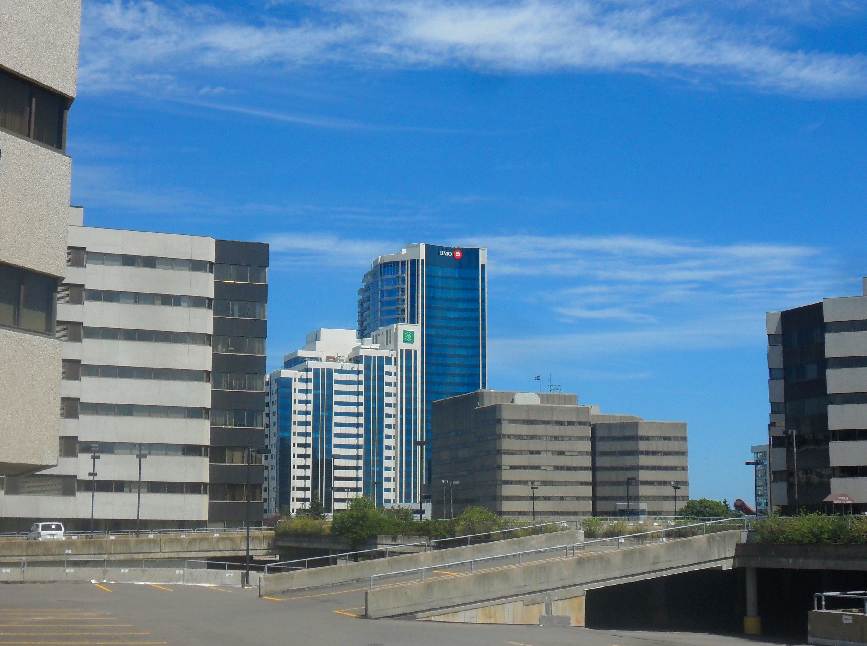 Centre-ville de Sainte-Foy